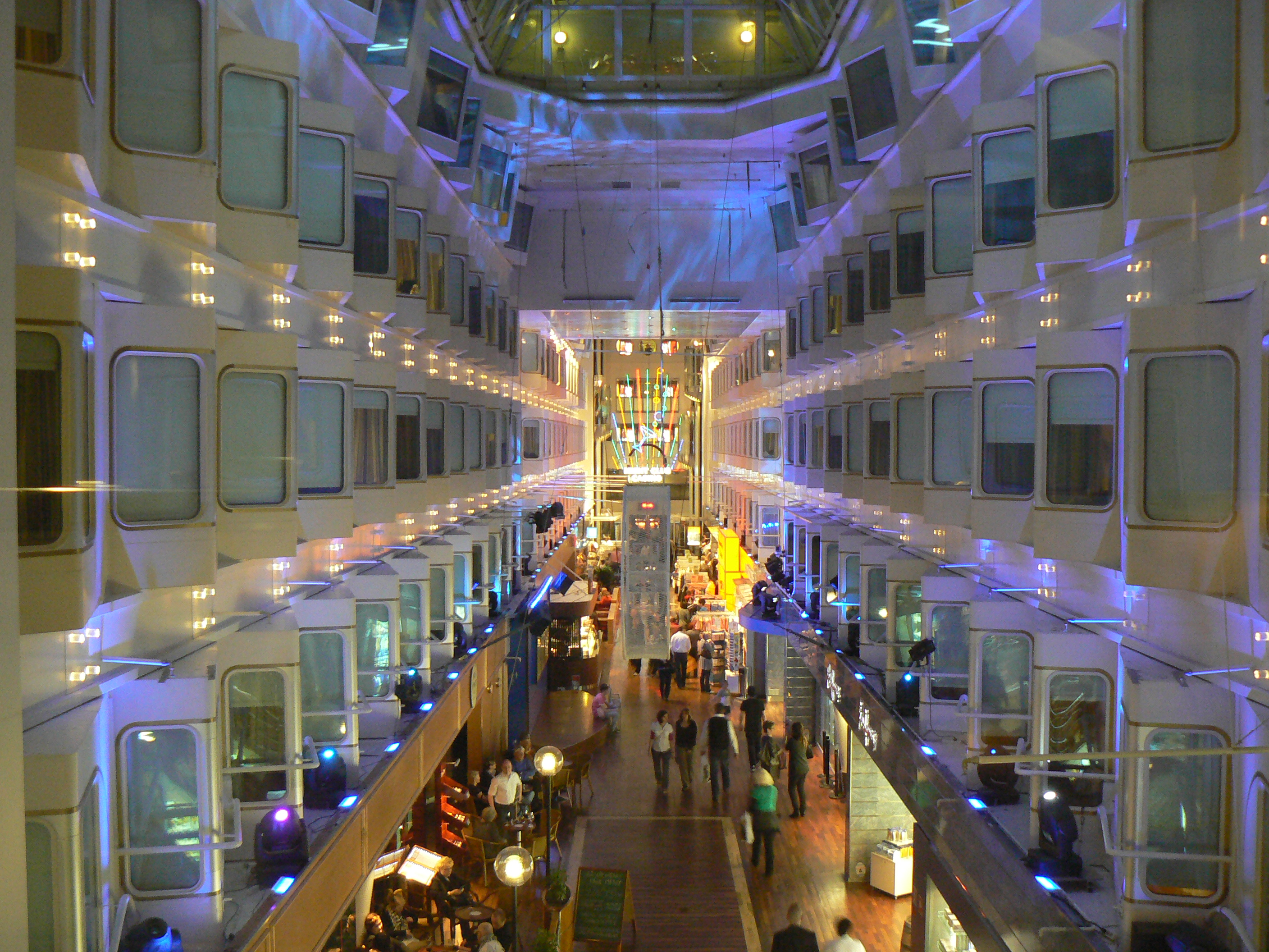 Description